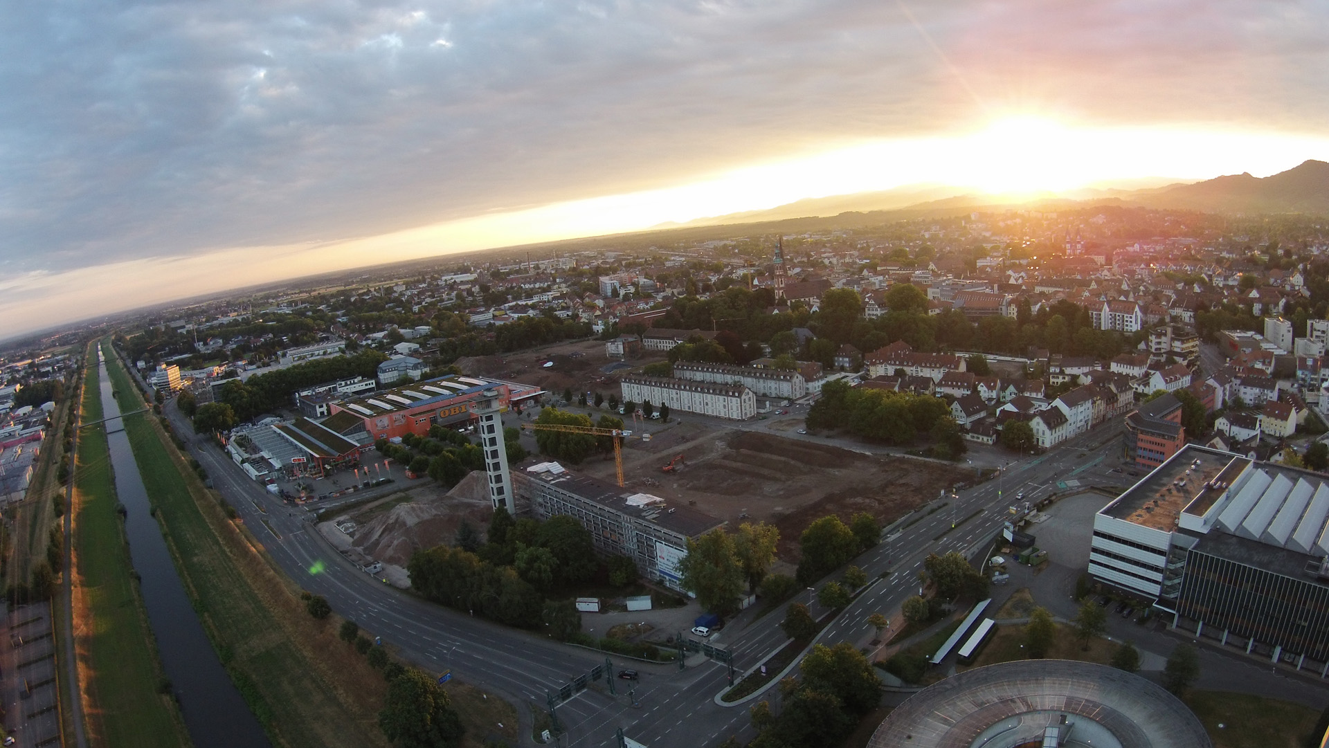 Diese Aufnahme von Offenburg wurde am 06.07.2014 aus ca. 150 Metern Höhe in der Nähe der Messe Offenburg-Ortenau aufgenommen. Es zeigt Offenburg im Vordergrund mit einem Sonnenaufgang am Rande des Schwarzwalds.